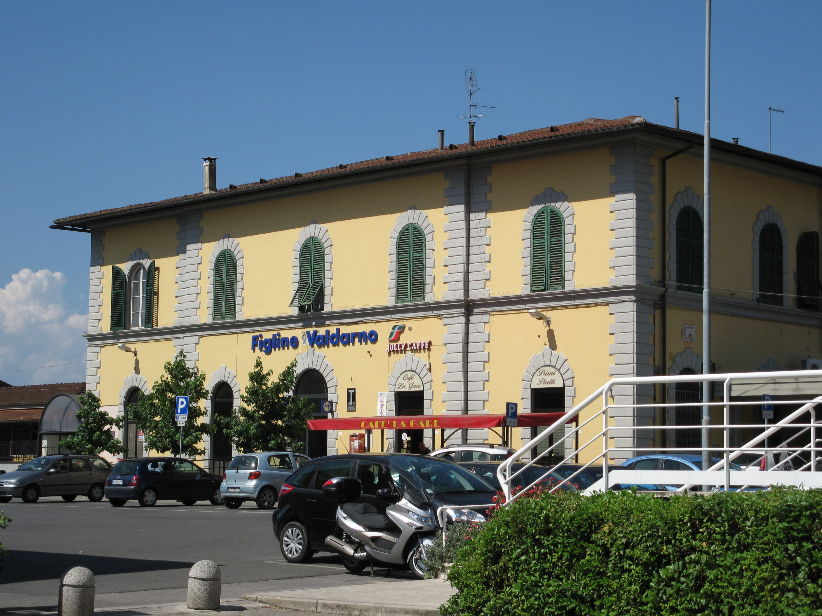 Vista facciata della stazione di Figline Valdarno da Piazza della Repubblica